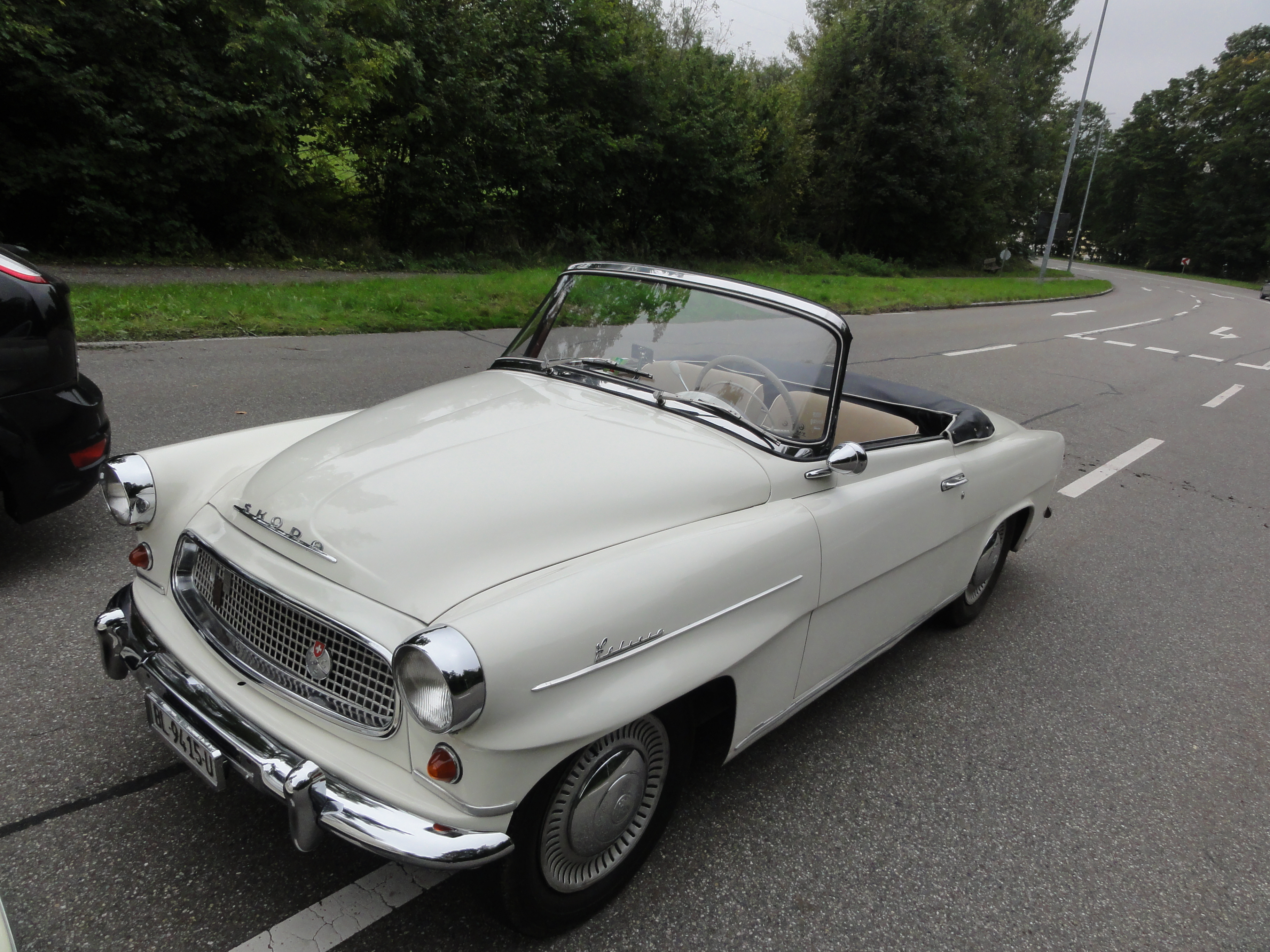 Škoda Felicia (1959 - 1964)